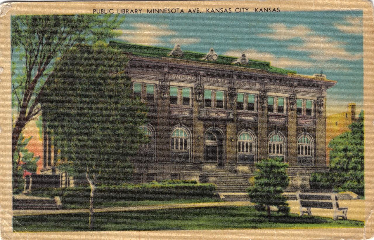 625 Minnesota Ave. Kansas City, KS 66101